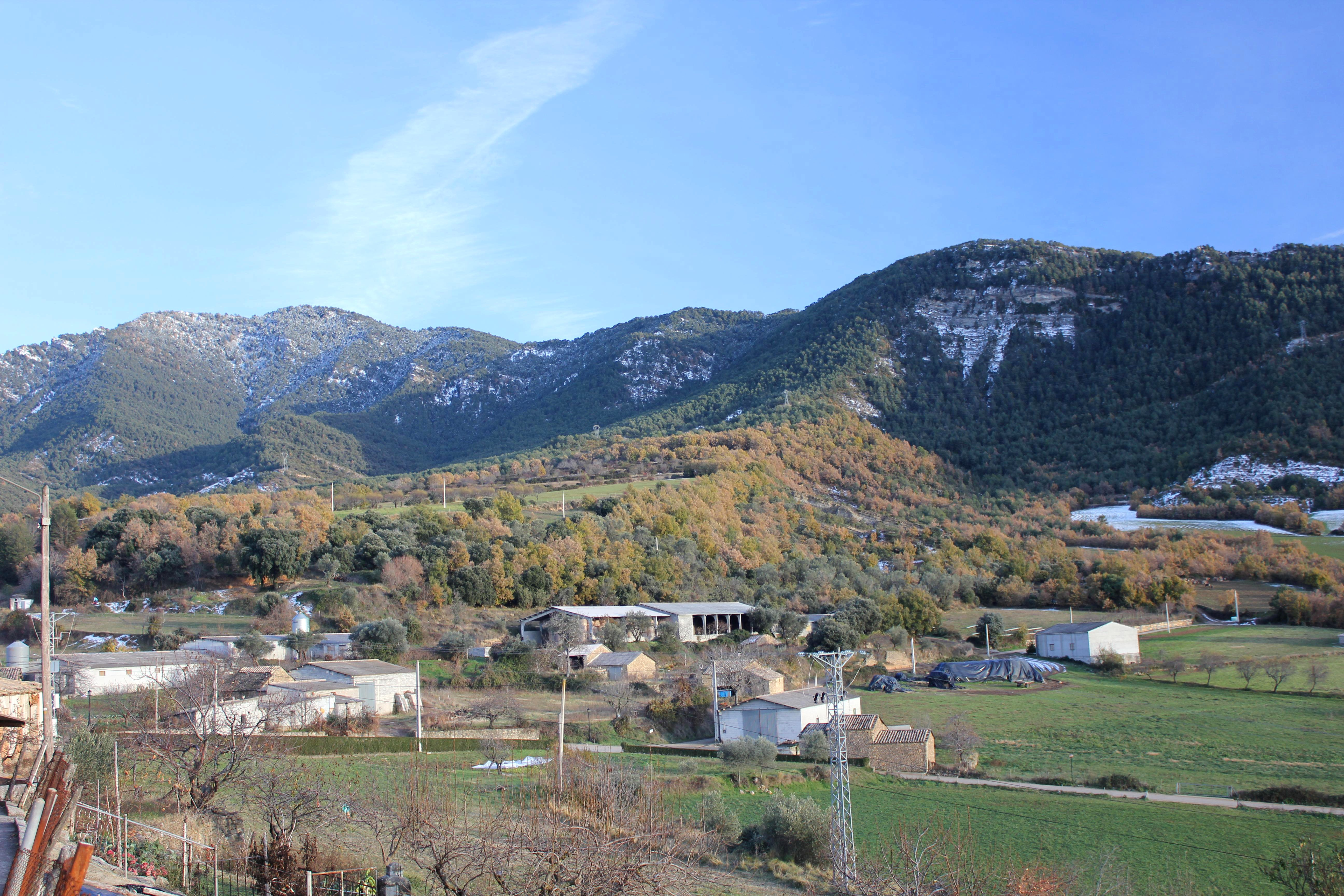 Aragonés: A sierra d'o Campanué vista dende Ranyín (A Fueva, Sobrarbe).